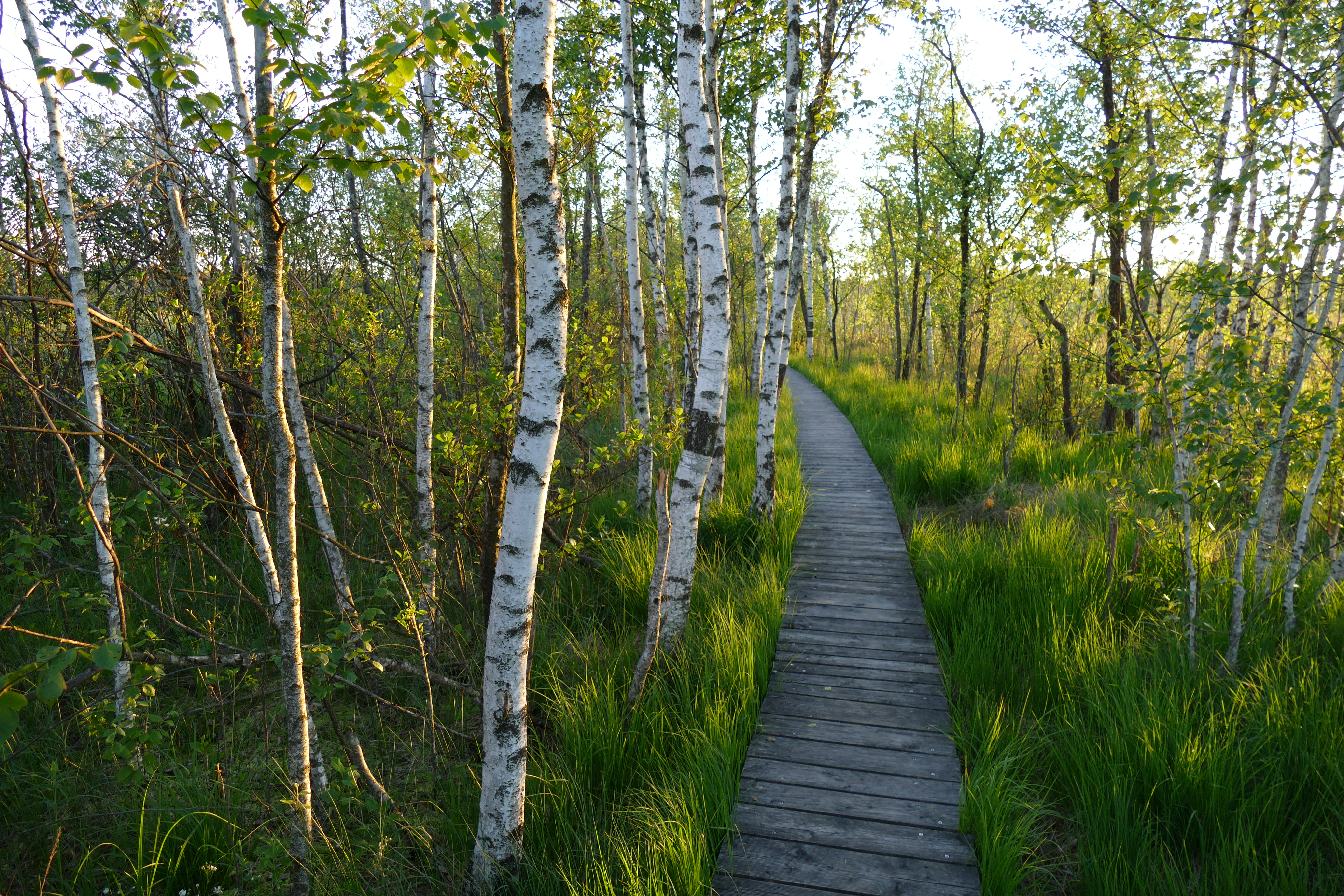 Moorweg im Ibmer Moor This media shows the nature reserve in Upper Austria with the ID n123.